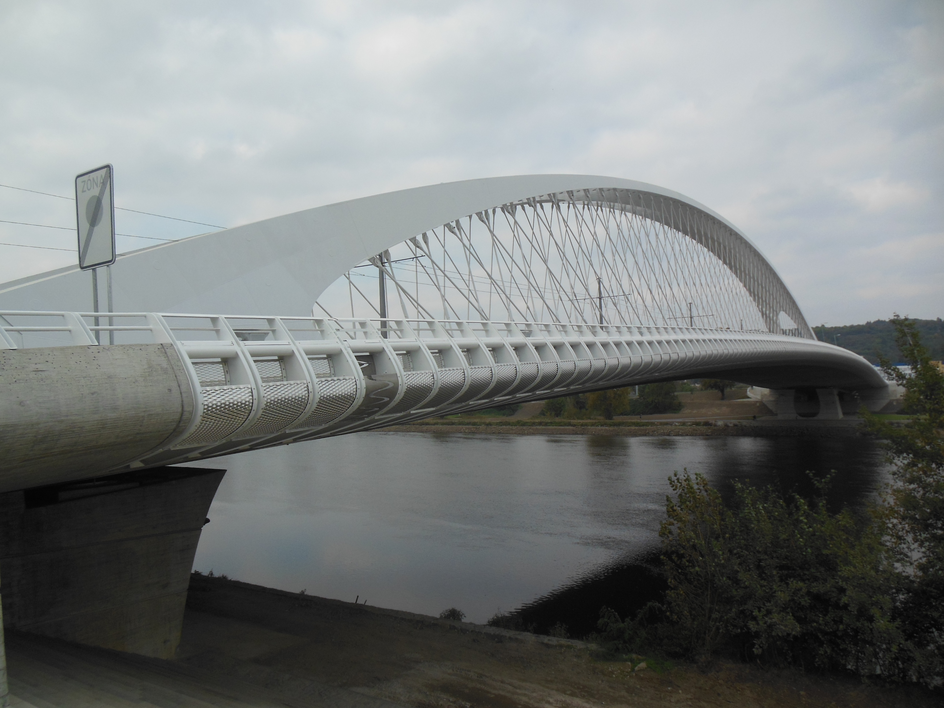 Praha-Holešovice. Trojský most.